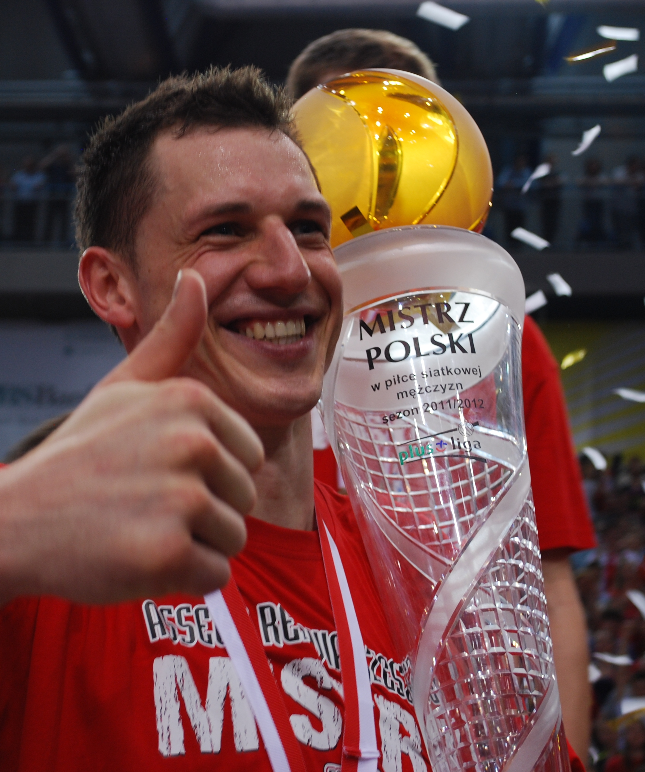 Olieg Achrem z Pucharem.